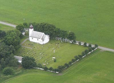 Storfosna kirke i Ørland kommune, Sør-Trøndelag